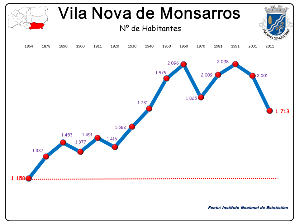 Freguesia